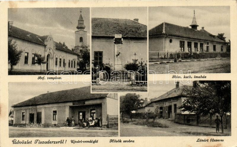 A község Fő útján található Ujvári-vendéglőt a falu nevezetességei között tüntetik fel.